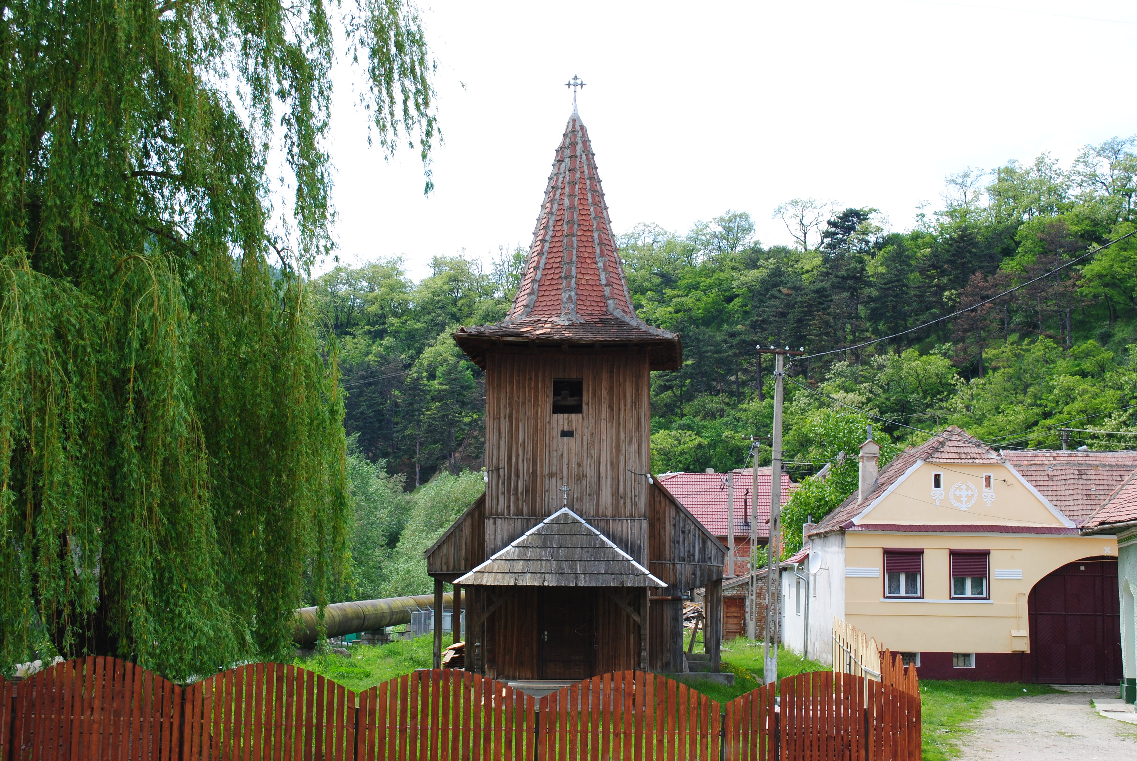 Biserica de lemn "Adormirea Maicii Domnului", sf. sec. XVIII